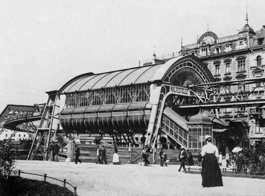 Erste Ausfuehrung des Schwebebahnhofs Döppersberg in Elberfeld